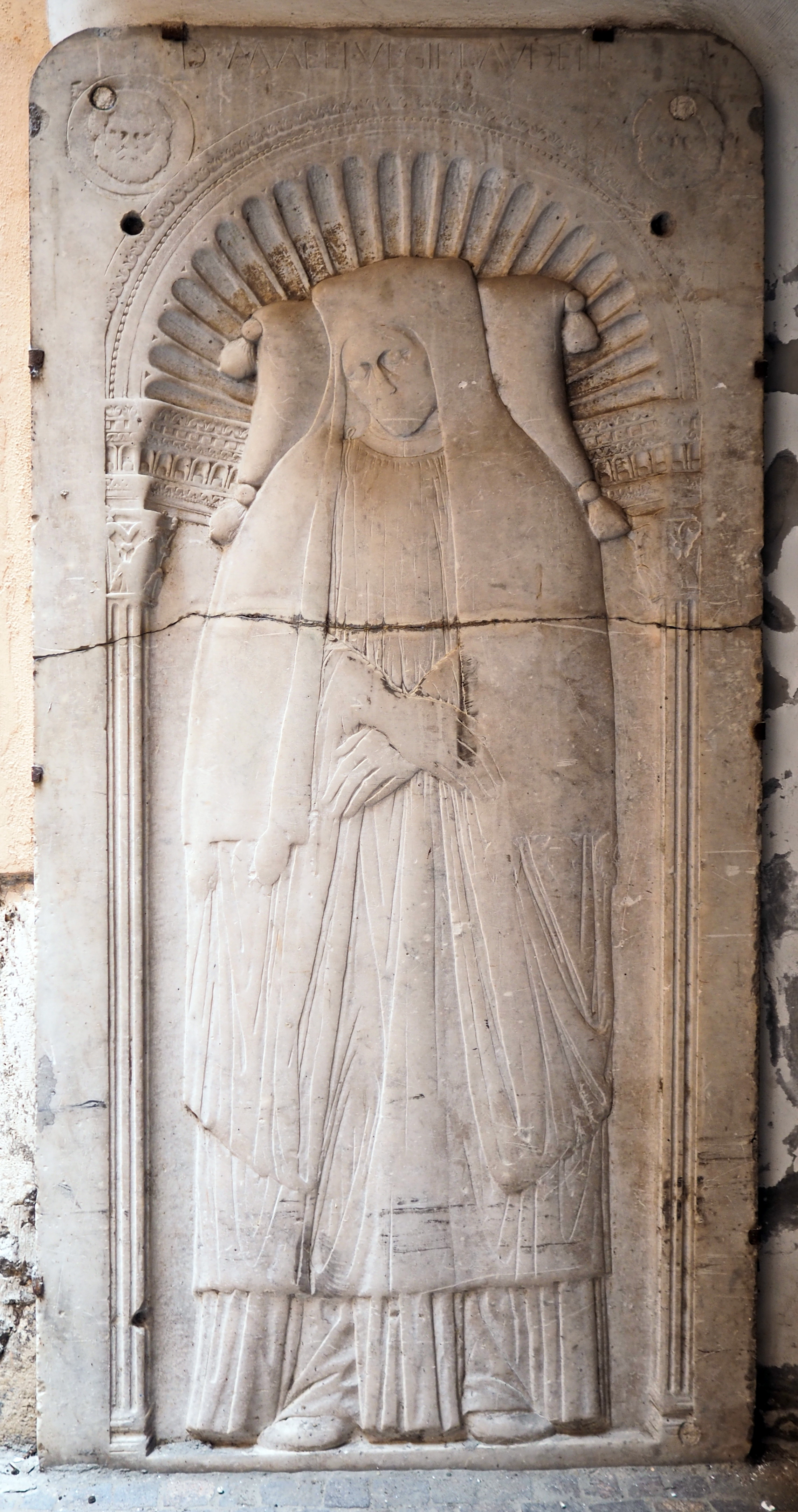 Sant'Agostino (Rom); Hof Grabplatte des Humanisten Maffeo Vegio